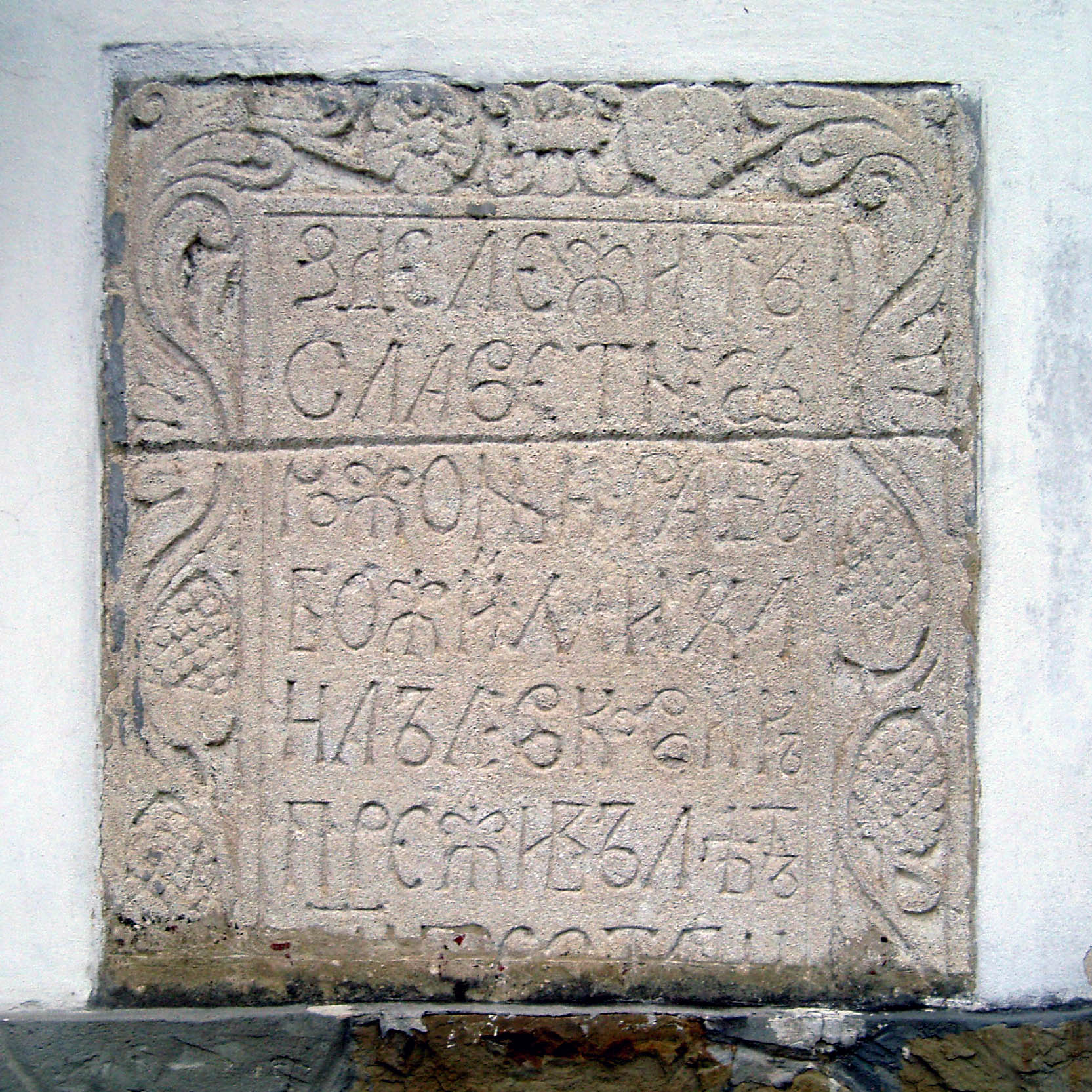 Надгробна плита Михайла Левковича, вмурована у стіну церкви святого Онуфрія у Львові.